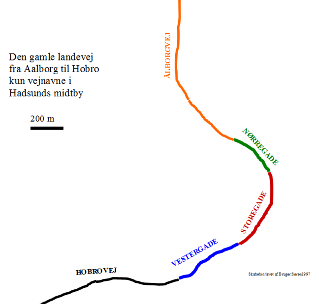 Dette er et billede af den gamle landevej fra Aalborg til Hobro. kun vejnavne i Hadsunds midtbyen.